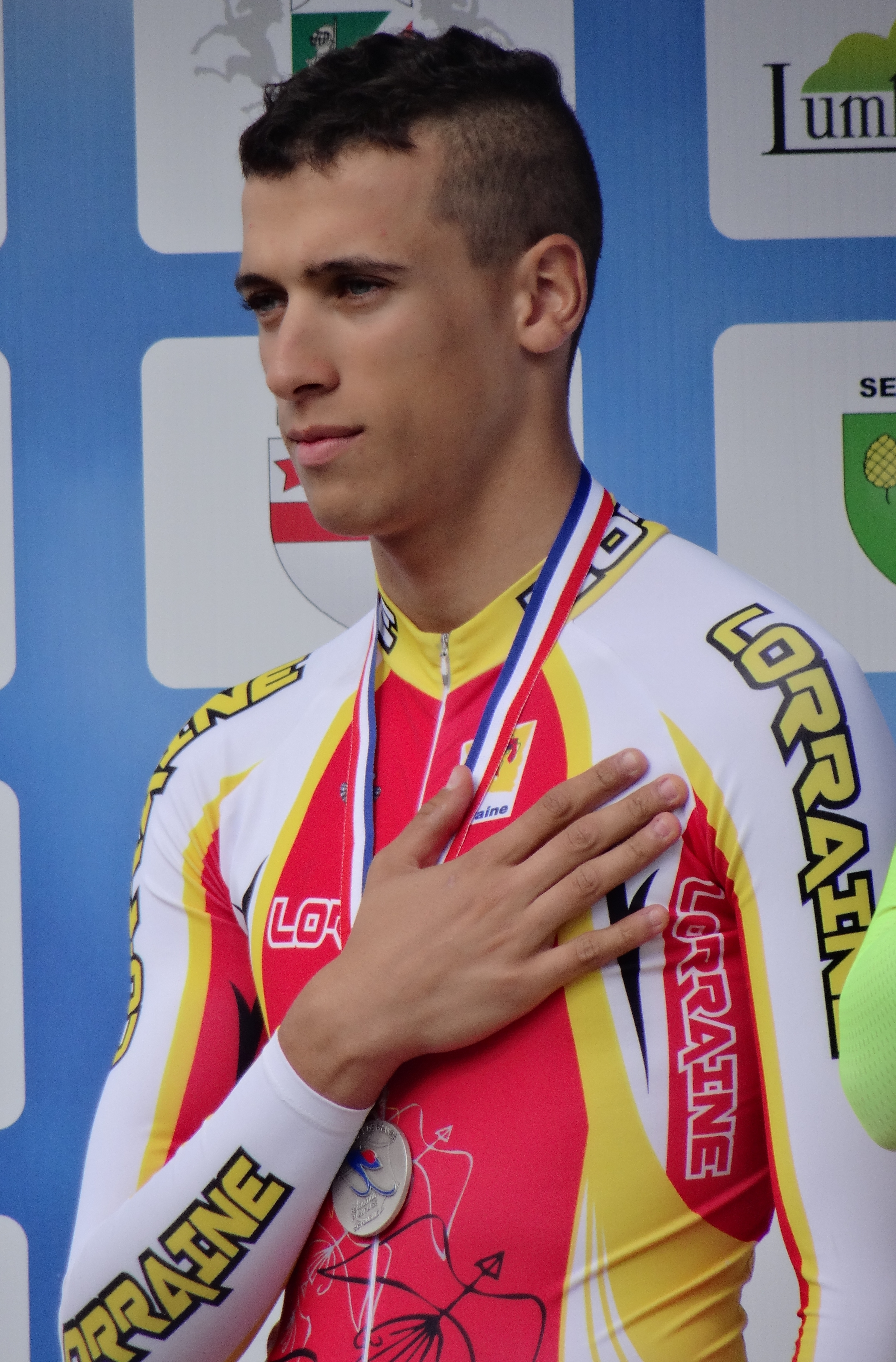 Reportage photographique réalisé le jeudi 21 août à l'occasion des Championnats de France de cyclisme sur route 2014 à Saint-Omer, Pas-de-Calais, Nord-Pas-de-Calais, France. La série A concerne le championnat de France du contre-la-montre juniors hommes, la série B le championnat de France du contre-la-montre espoirs hommes, la série C la remise des prix aux juniors hommes et la série D la remise des prix aux espoirs hommes. Depicted person: Rayane Bouhanni